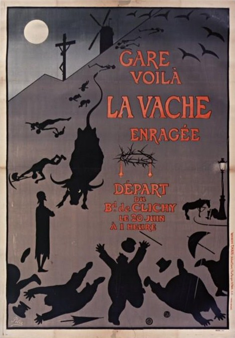 Affiche d'annonce de la 2ème Promenade de la Vache enragée ou Vachalcade à Montmartre le 20 juin 1897.